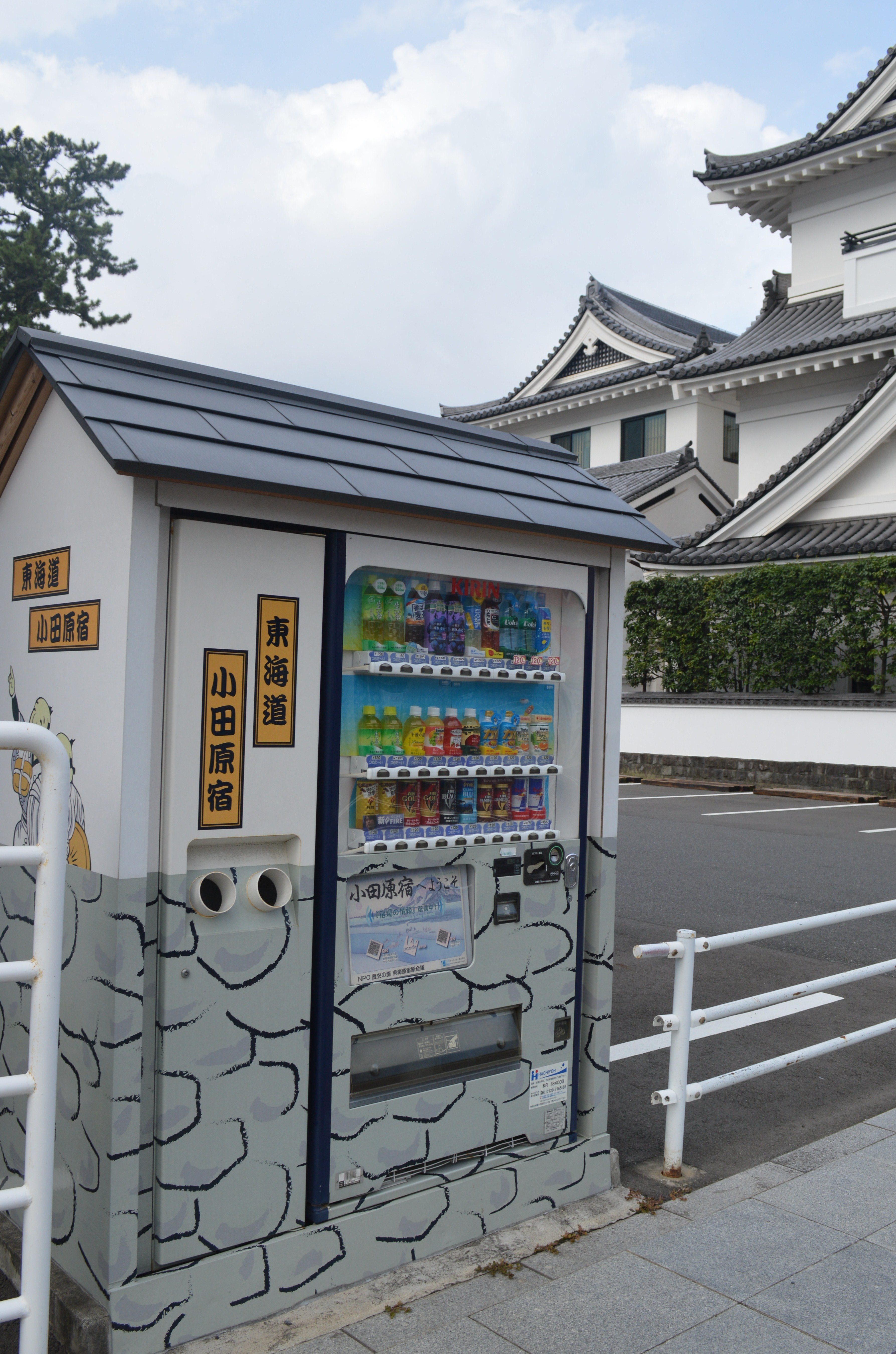 神奈川県小田原市にある自動販売機